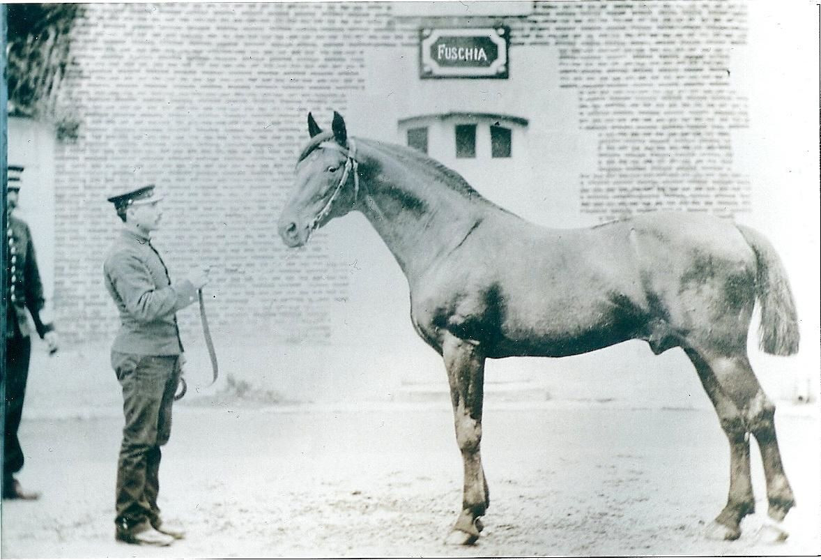 Portrait de l'étalon trotteur Fuschia, né en 1883